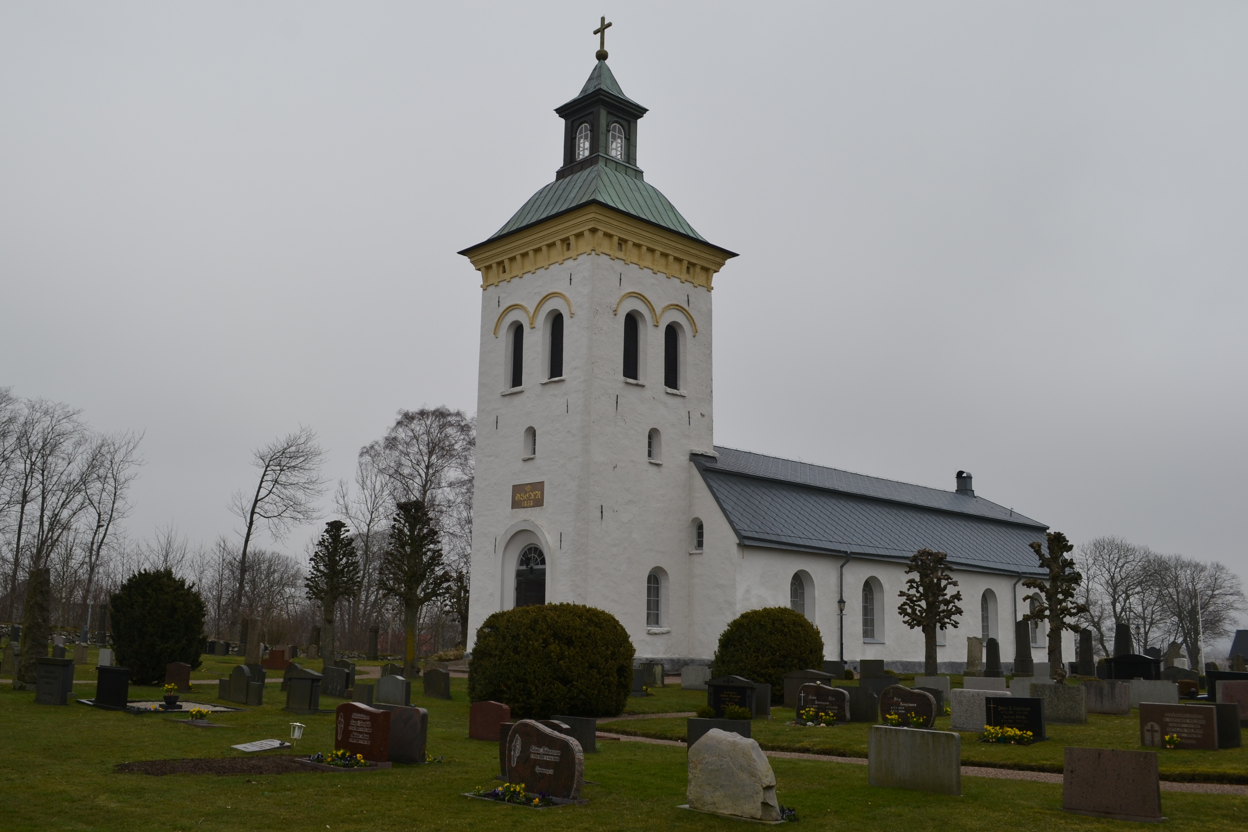 Spannarps kyrka, Halland.